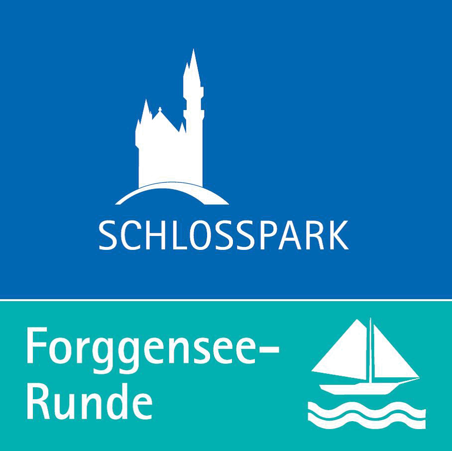 Logo Forggensee-Runde